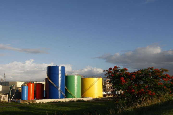 Somos una de las 7 plantas de reciclaje de aceite usado de motor en el mundo y la única en América Latina y el Caribe.